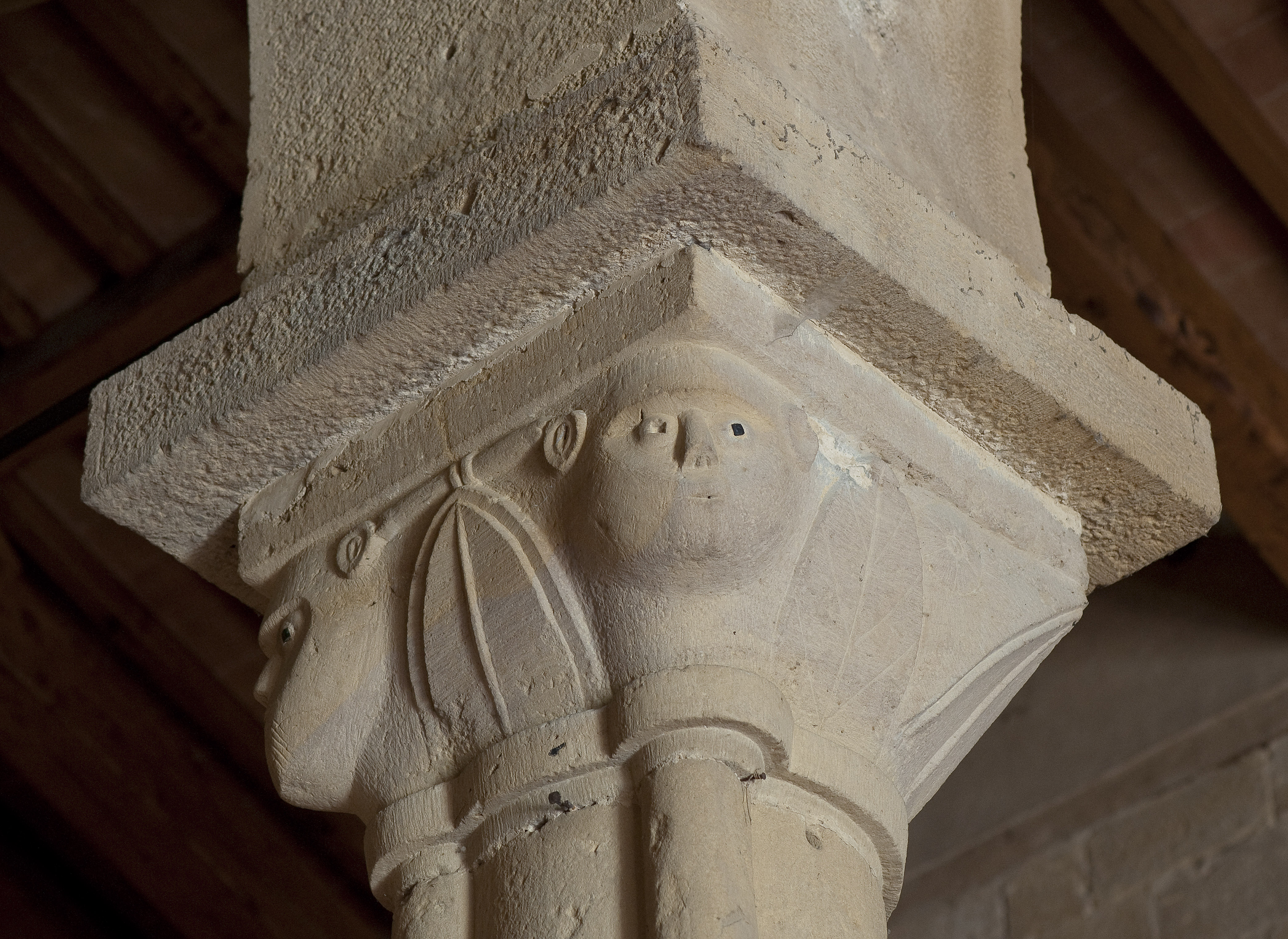 Capitello nella Pieve di Santa Maria Assunta a Chianni, Gambassi Terme